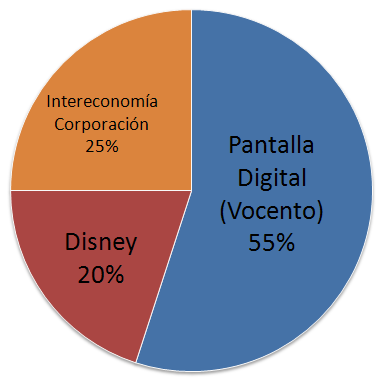 Net TV - Accionariado desde 2008